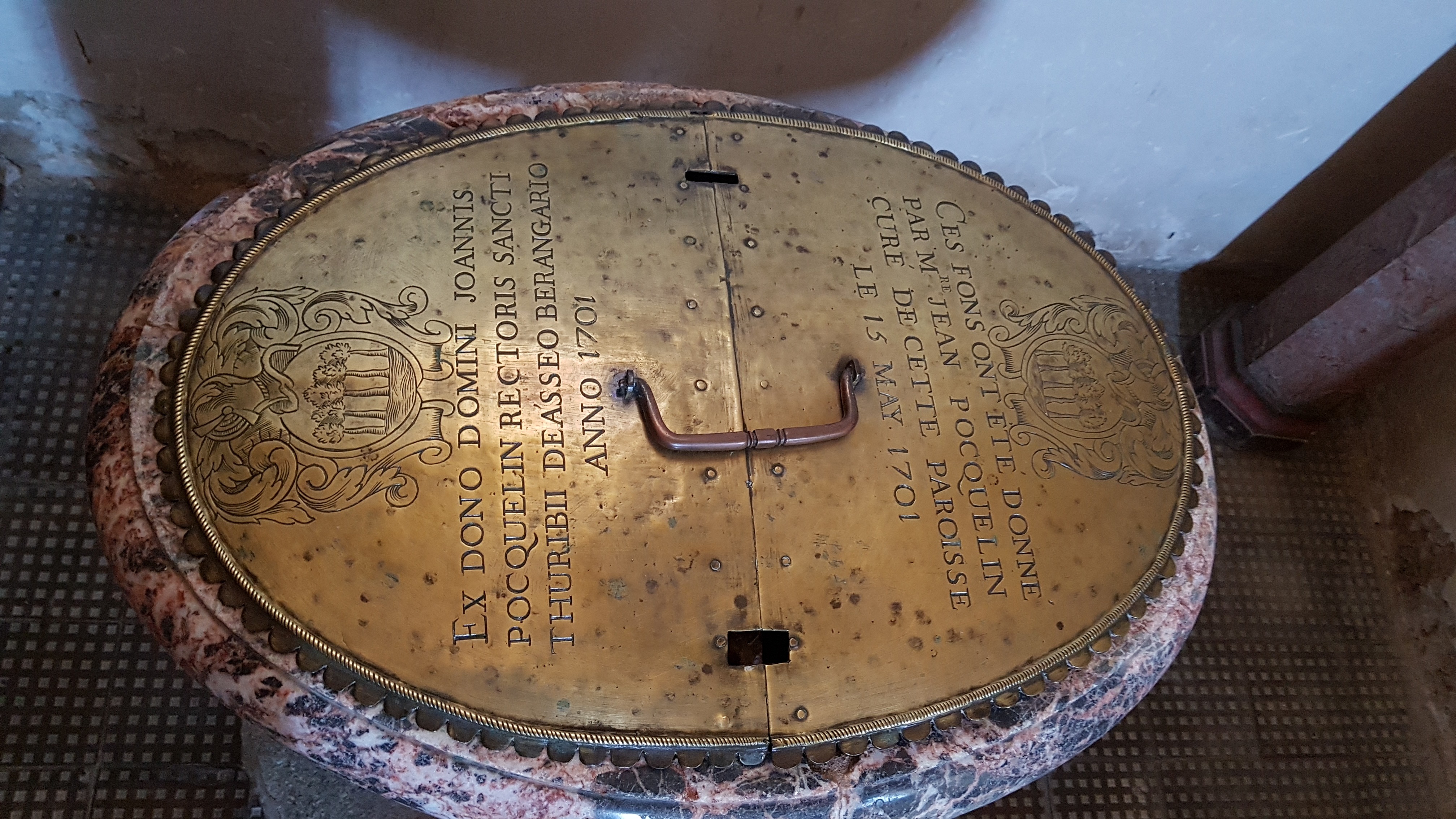 couvercle des fonts baptismaux offerts en 1701 par Jean Pocquelin, curé d'Assé-le-Bérenger avec armoiries de la famille Pocquelin. Les fonts baptismaux ont été réinstallées dans la nouvelle église en 1882 reconstruite à l'emplacement de l'ancienne